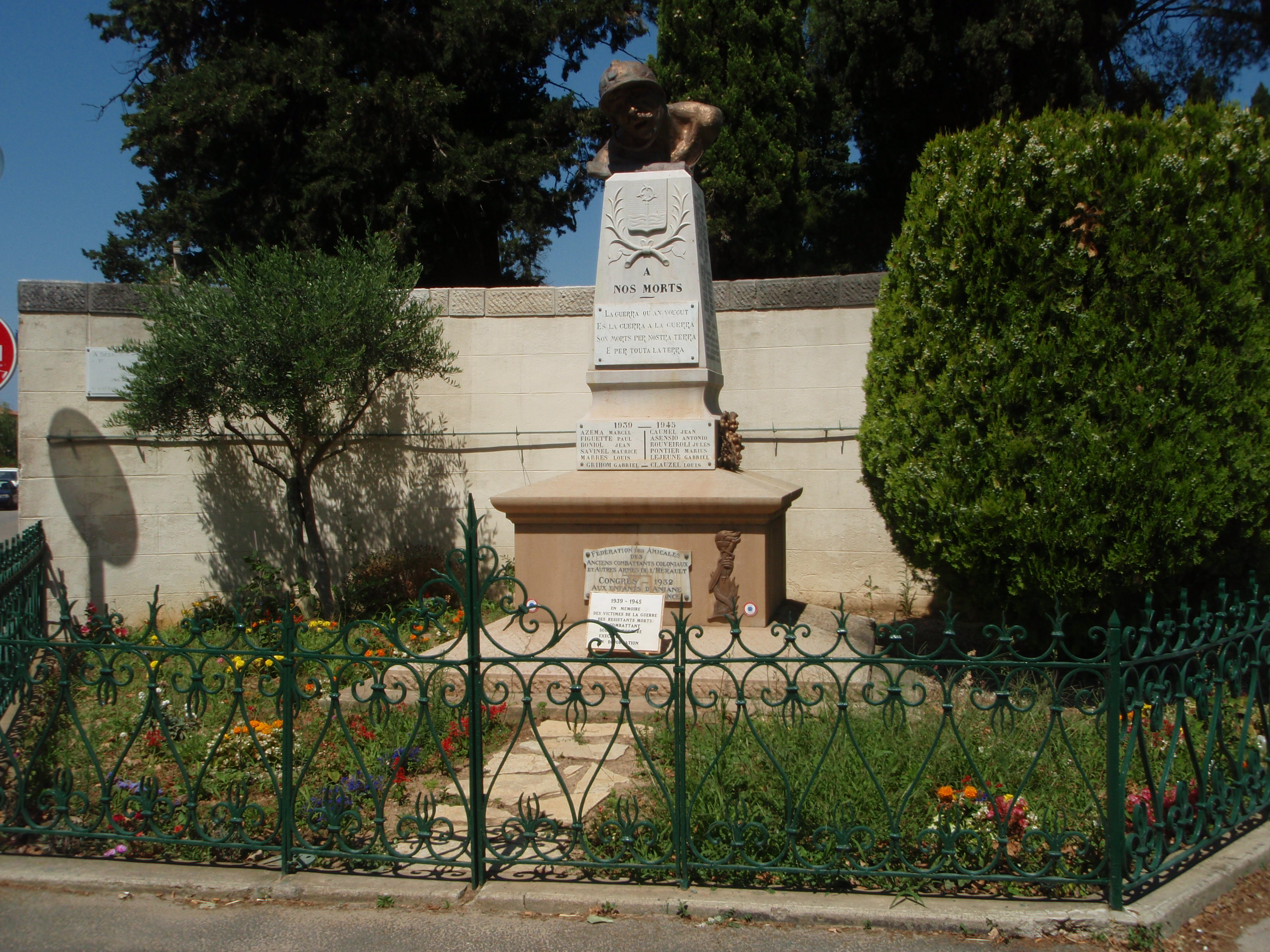 Aniane (Hérault) - Monument aux morts de la guerre 1914 - 1918 réalisé dans les années 1920